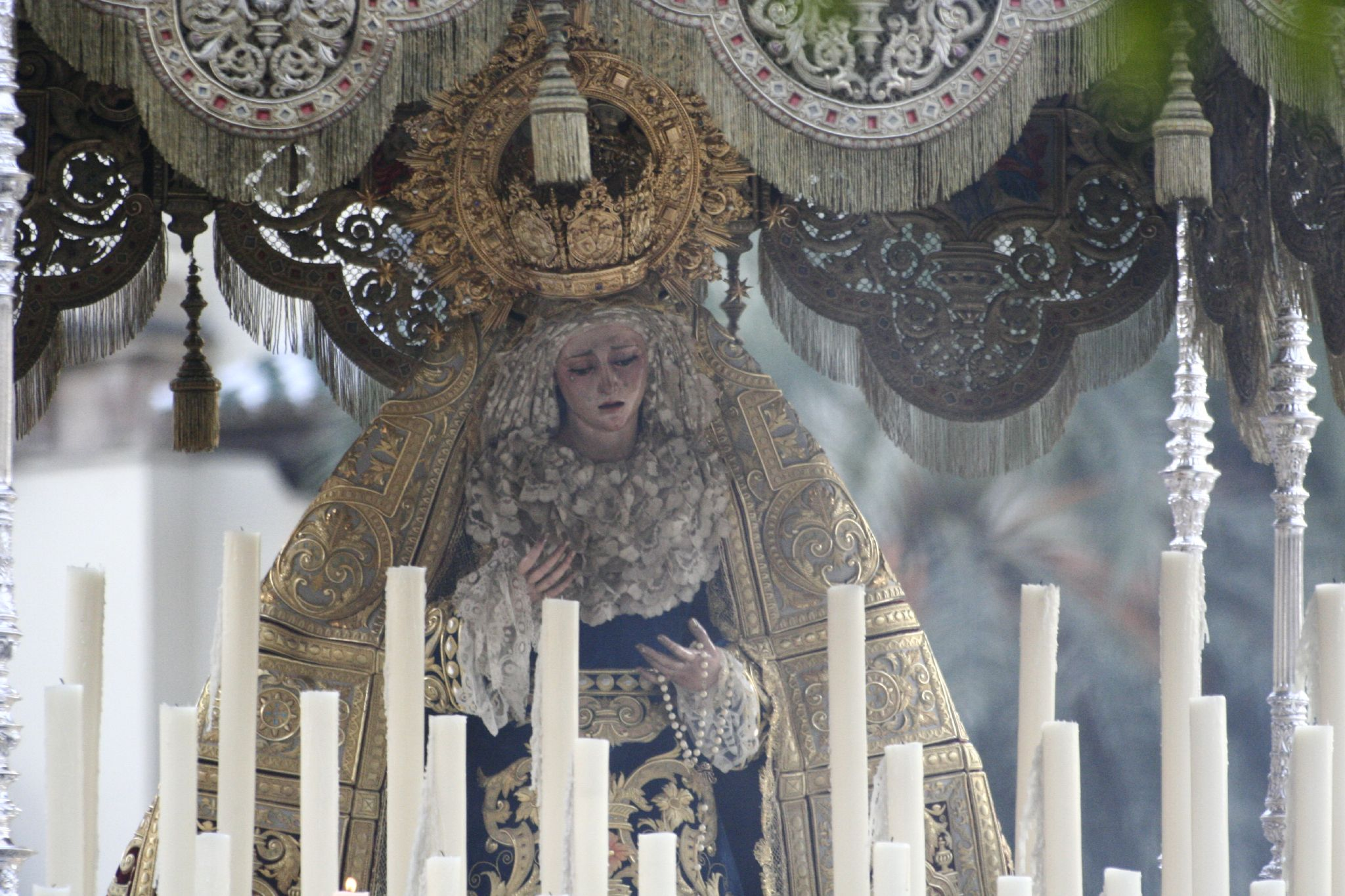 María Santísima de la Angustia. Semana Santa en Sevilla.